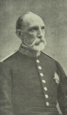 Francisco de Loño, ministro de la Guerra.